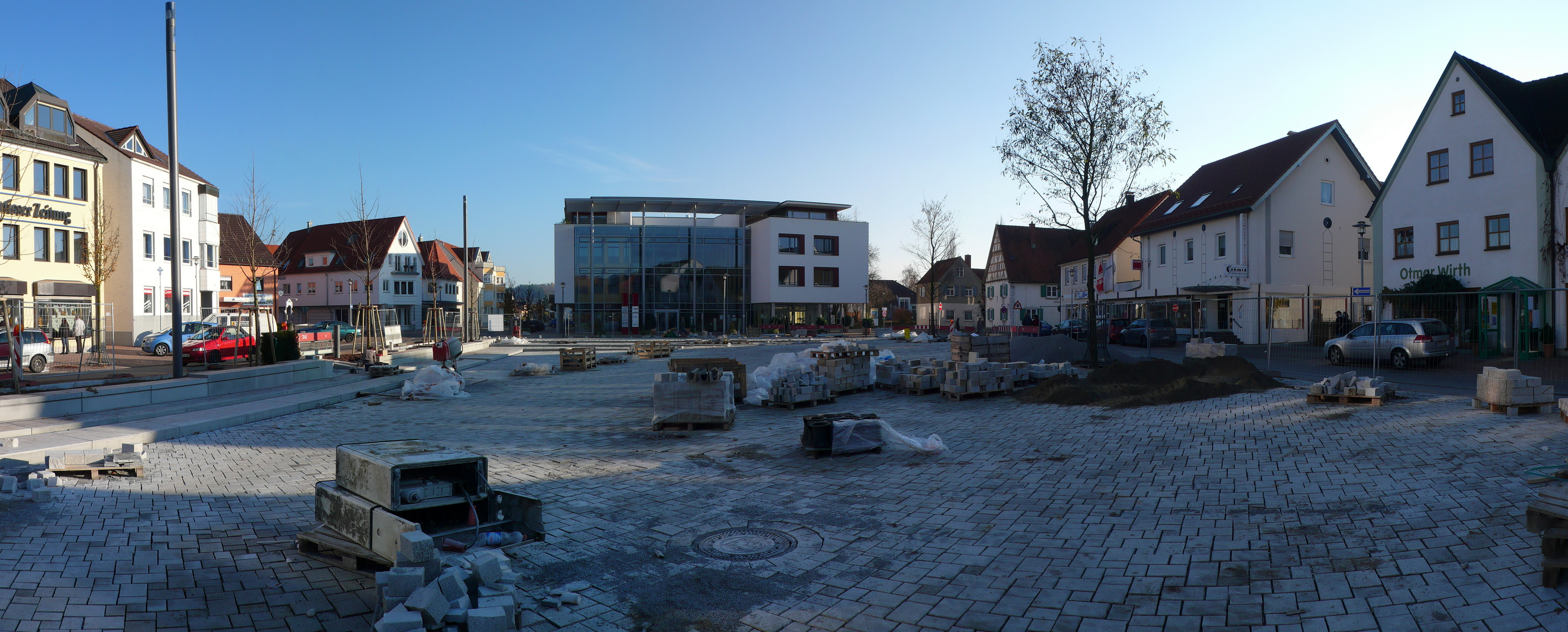 Marktplatzsanierung Illertissen